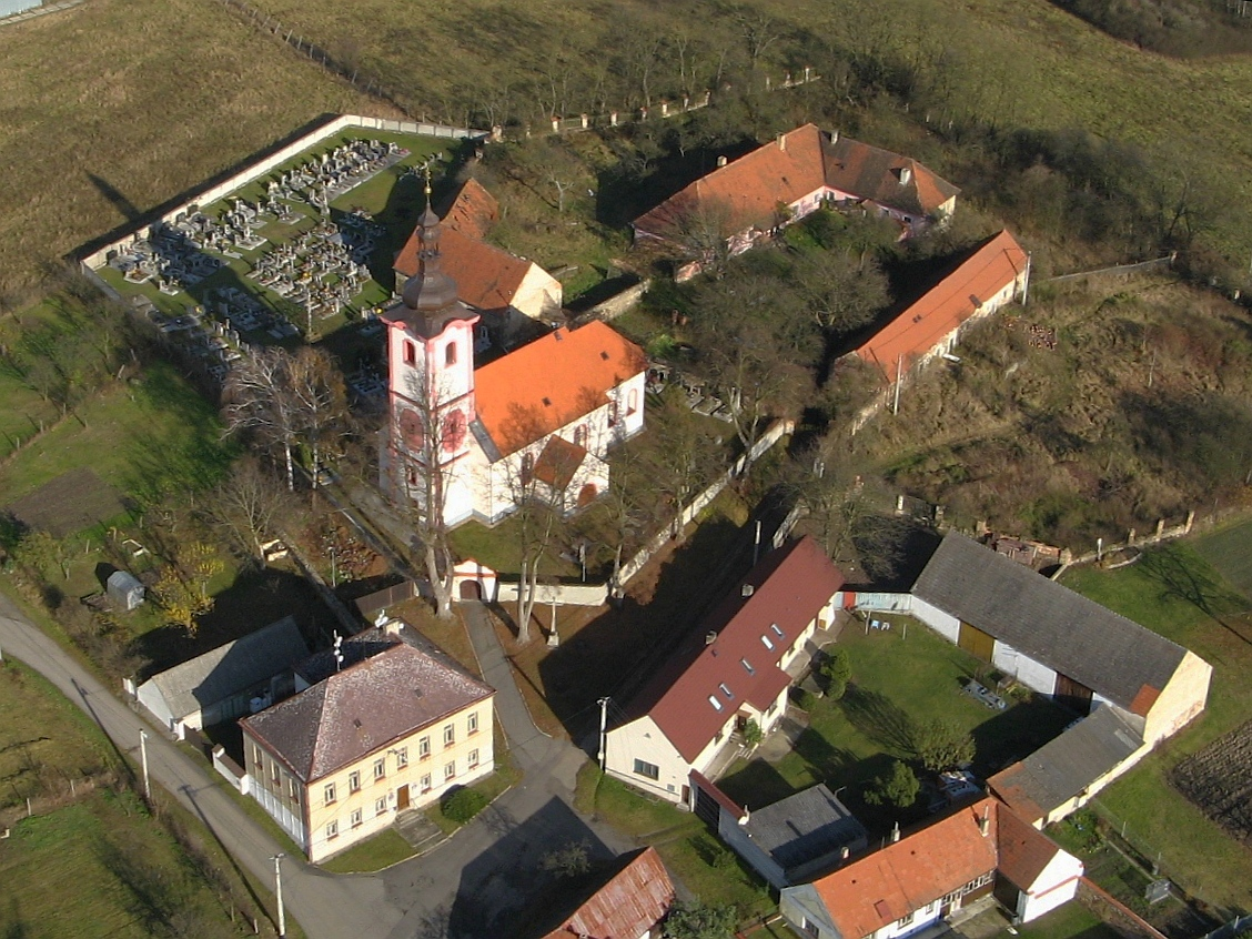 Kostel sv. Václava (Dráchov), Dráchov